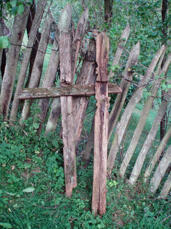 Ultimile cruci de lemn în cimitirul vechi.